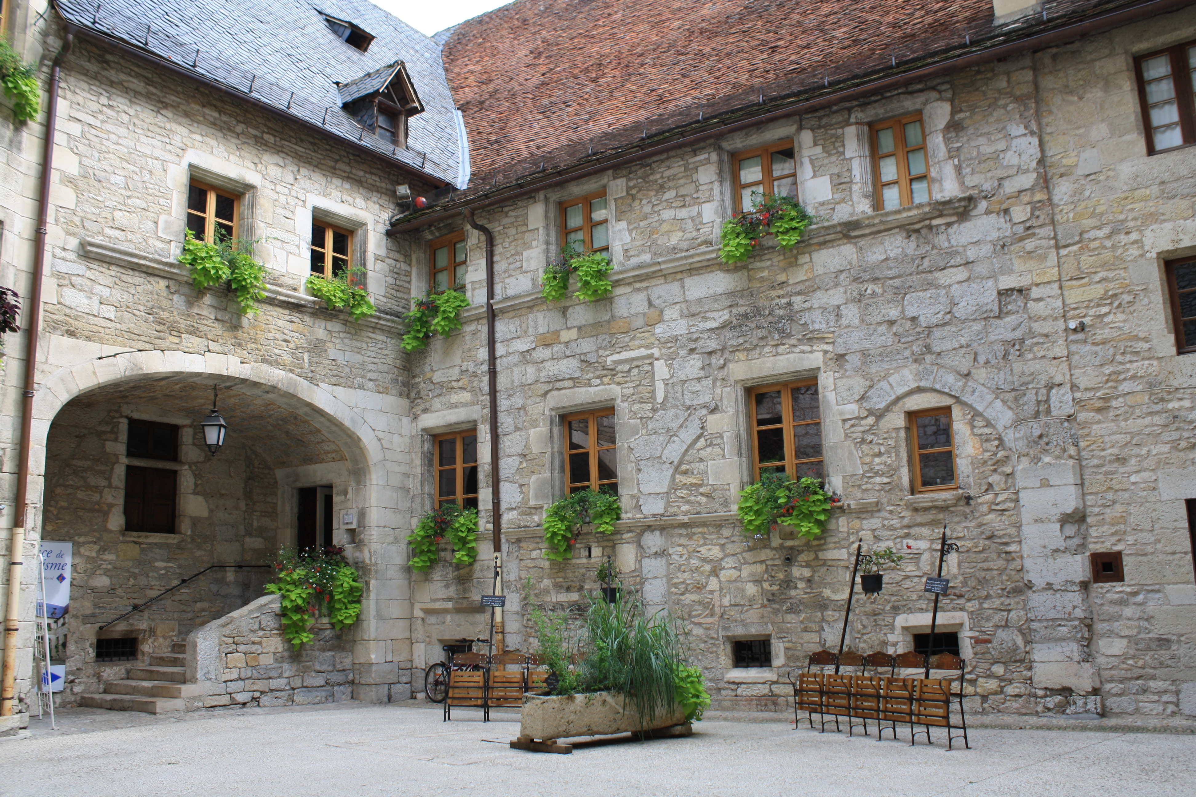 Hôtel de ville de Martel, Place du MarchéRue de SenlisRue Tournemire (ClasséClasséInscrit, 190619261926) .